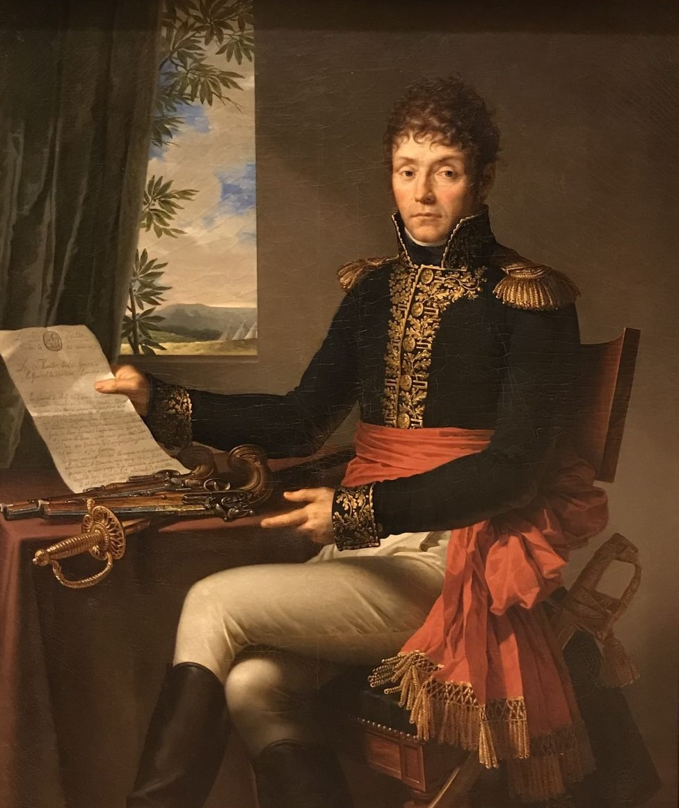 Général Louis Lemoine (1764-1842)